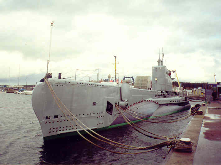 Lembit